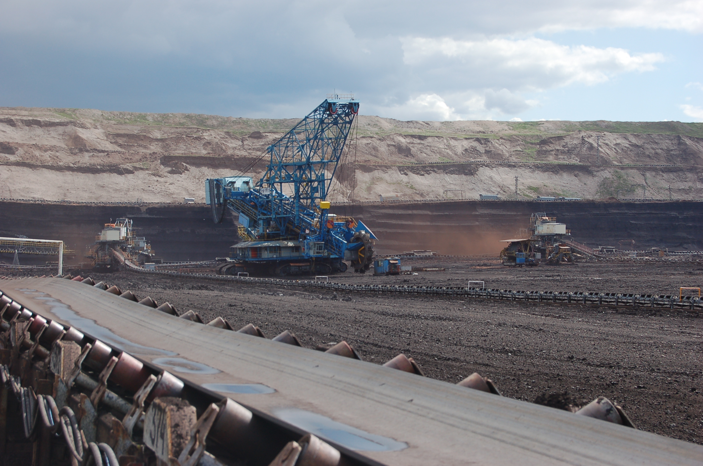 Velkostroje v Dole Nástup Tušimice